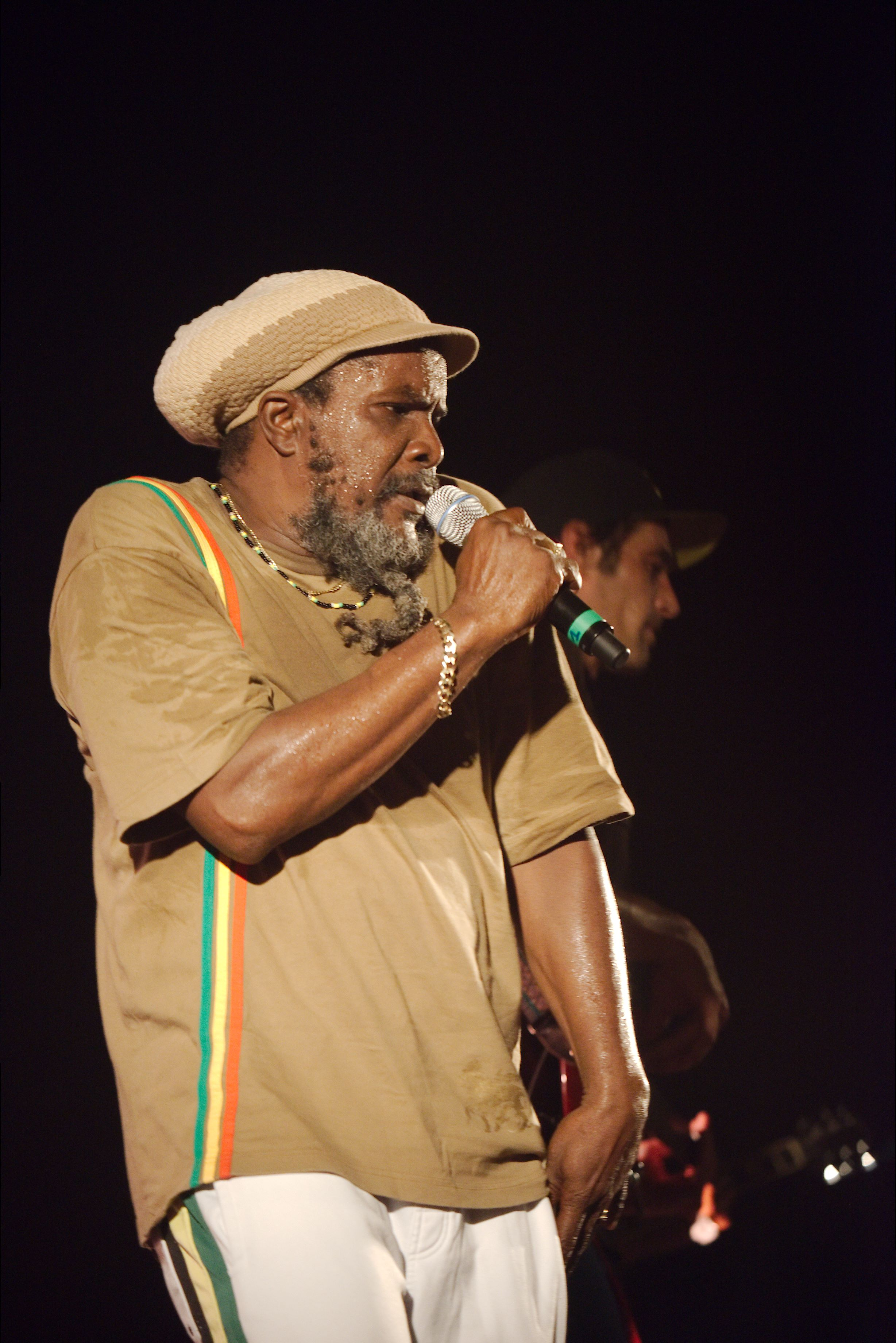 Photo de Pablo Moses, au cabaret frappé 2012.